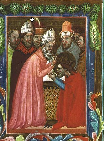 SV. Ladislav